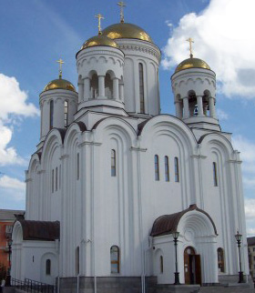 Храм во имя Преображения Господня в Серове